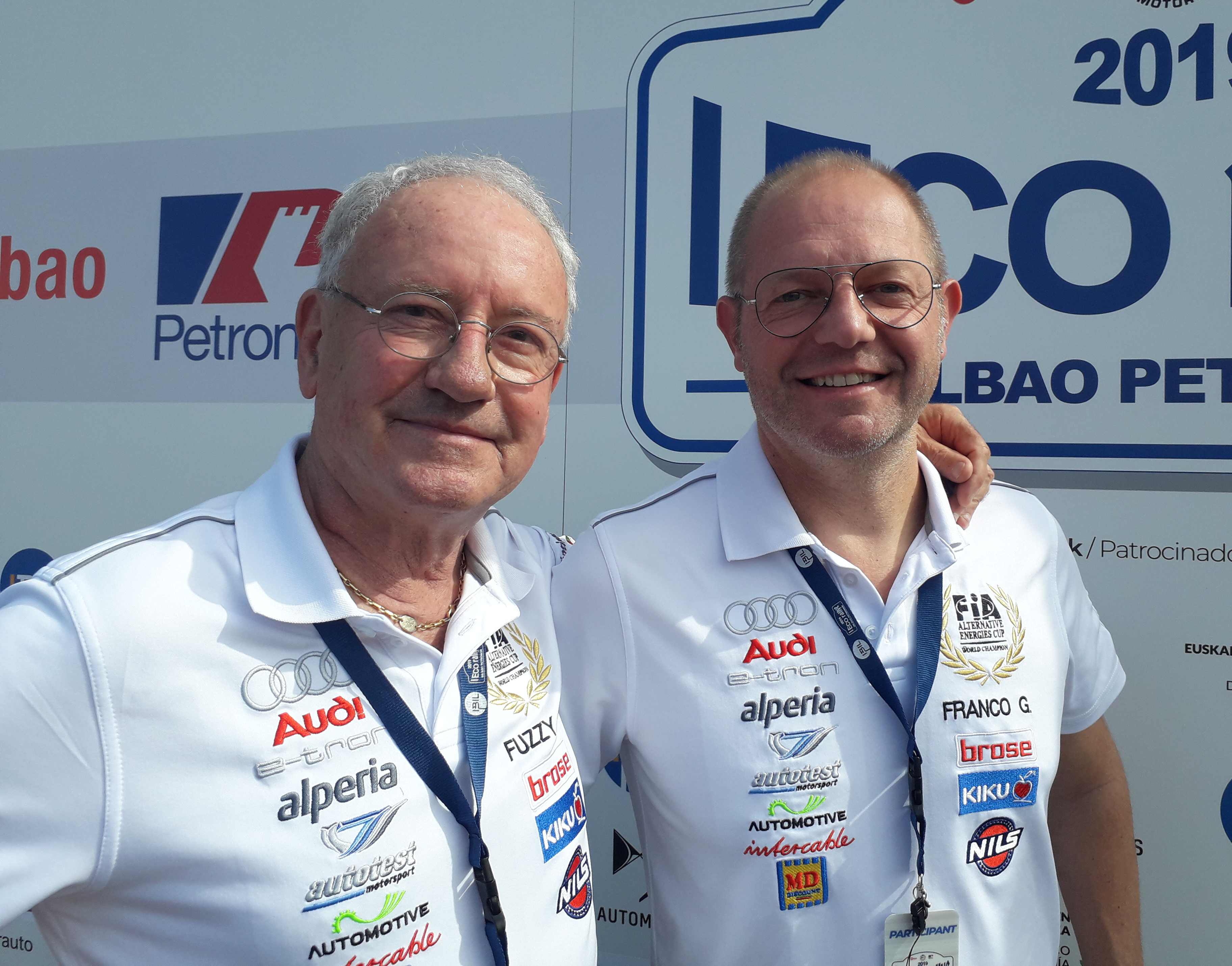 Fuzzy Kofler e Franco Gaioni all'Eco Rallye Bilbao-Petronor il 13 ottobre 2019